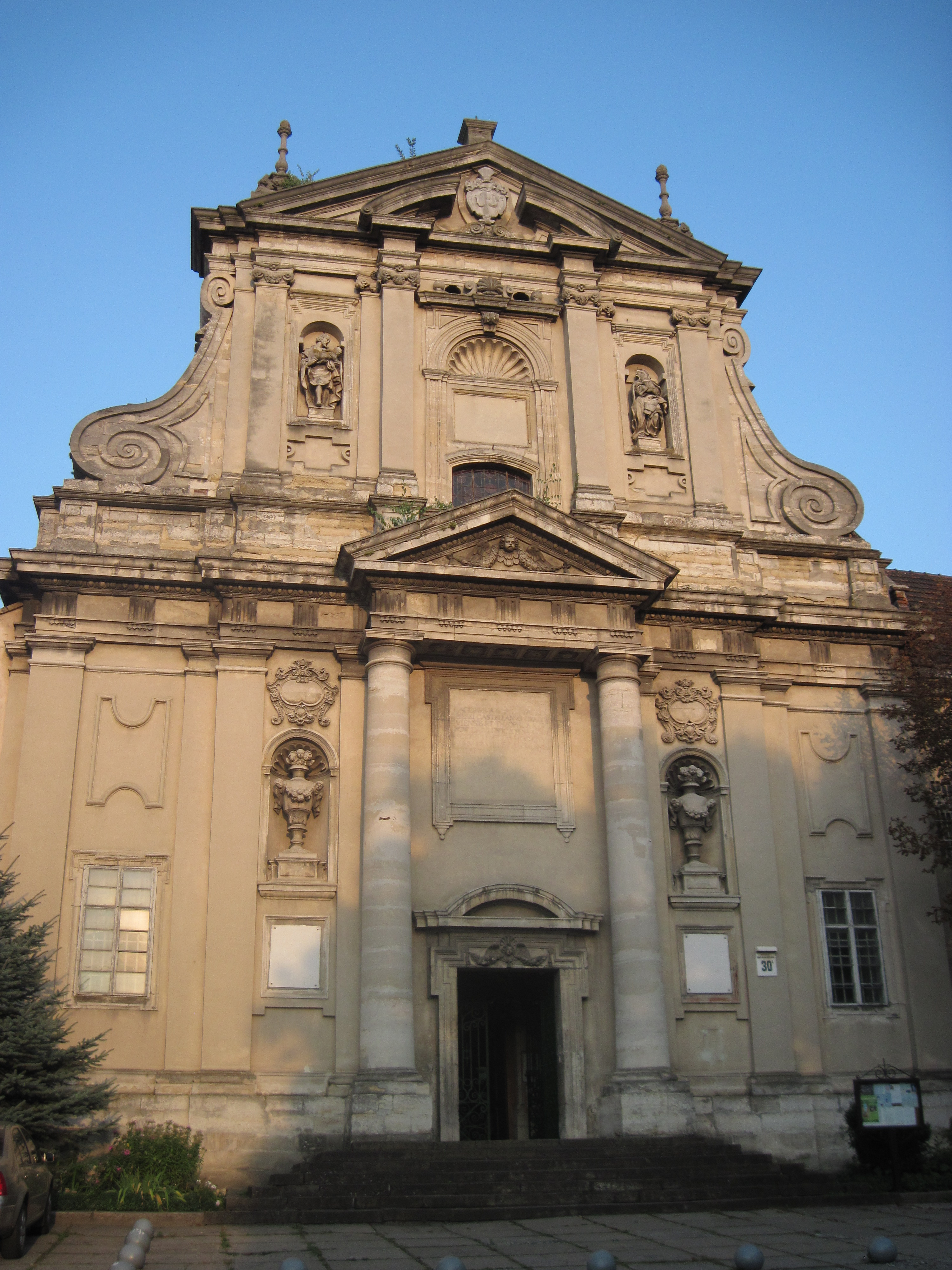 Церква Стрітення Господнього (костел Матері Божої Громничої, Львів)